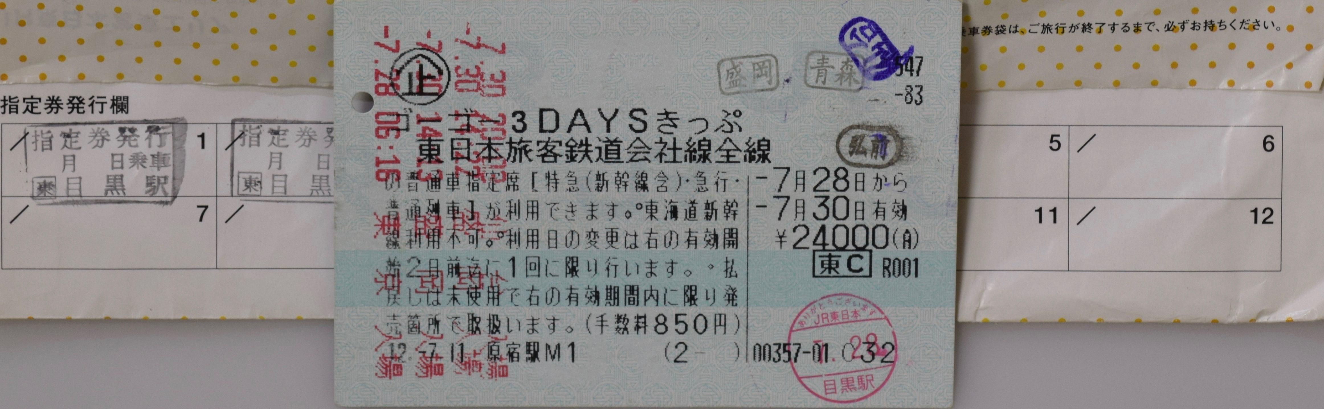 ゴーゴー3daysきっぷ 専用のチケットホルダーがあり、指定券発行記録をホルダーに押印した